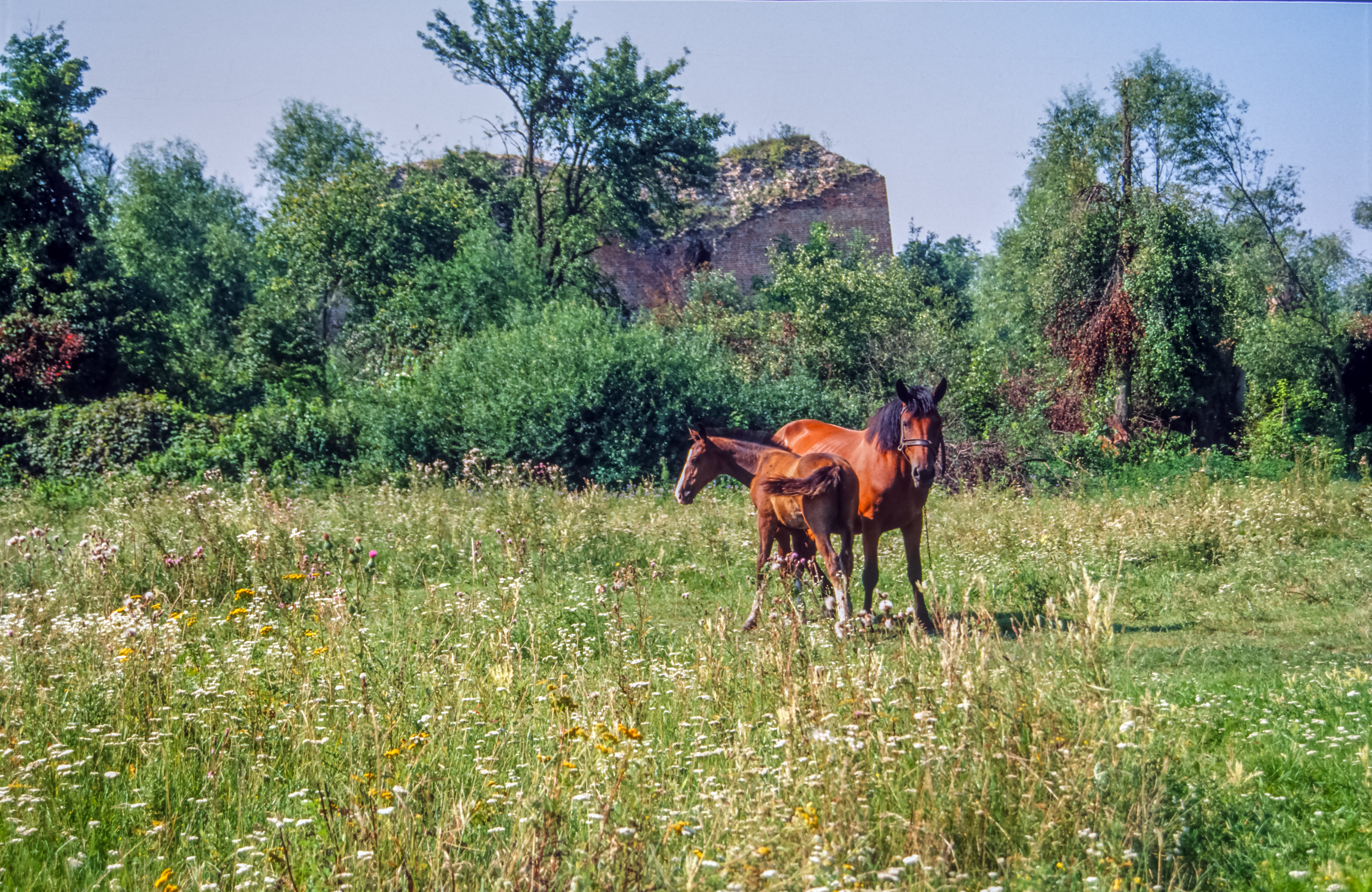 Kryłów